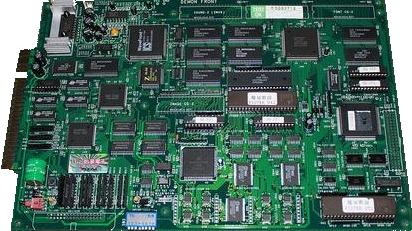 Jeu vidéo d'arcade Demon Front au format PCB